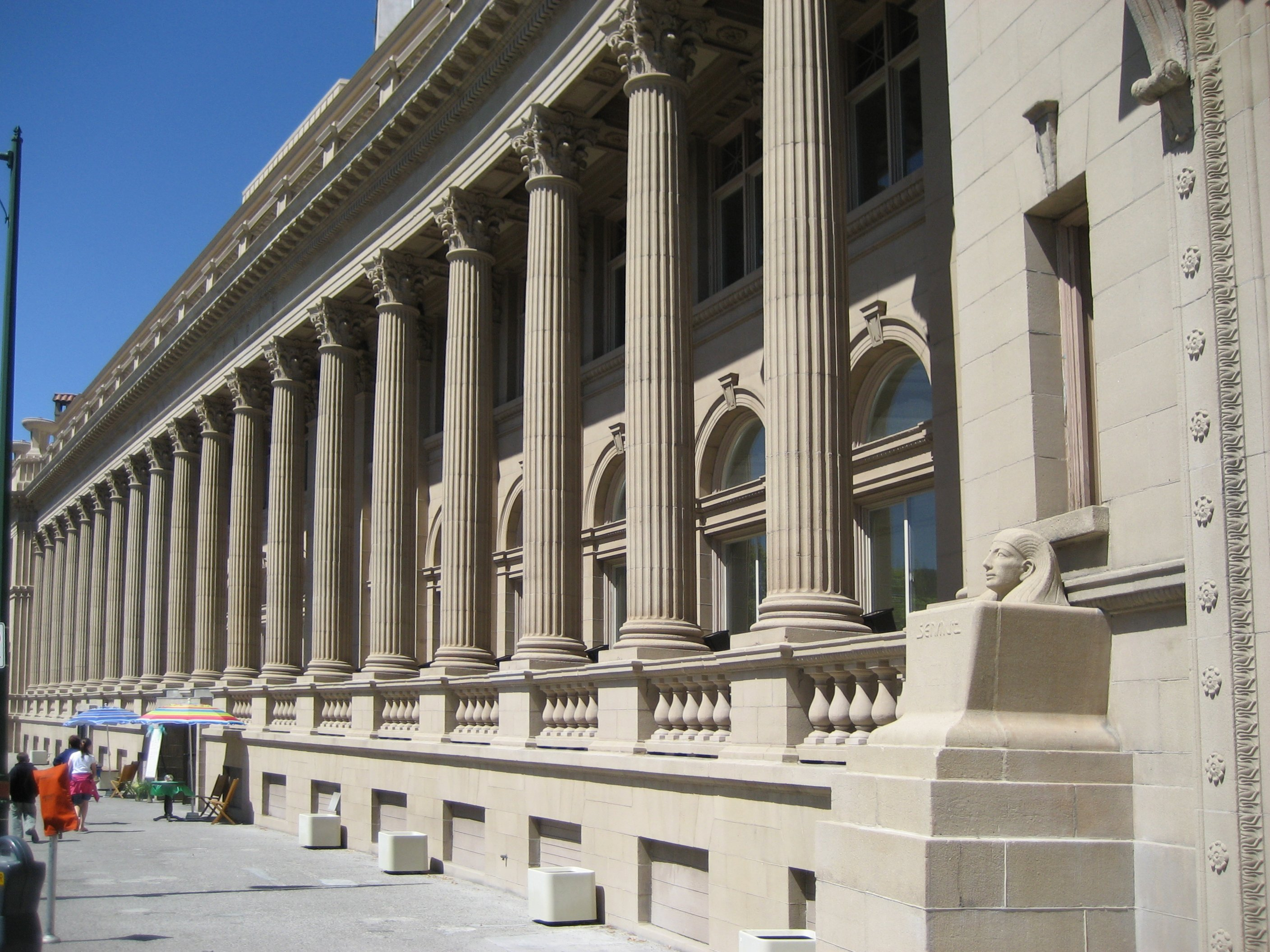 Photo du temple maconnique de Spokane, État de Washington, USA. Cette photo a été prise par Declic Declic 9 août 2006 à 02:01 (CEST) Ce temple maconnique est toujours le plus imposant de la cote Ouest des USA. Site du temple